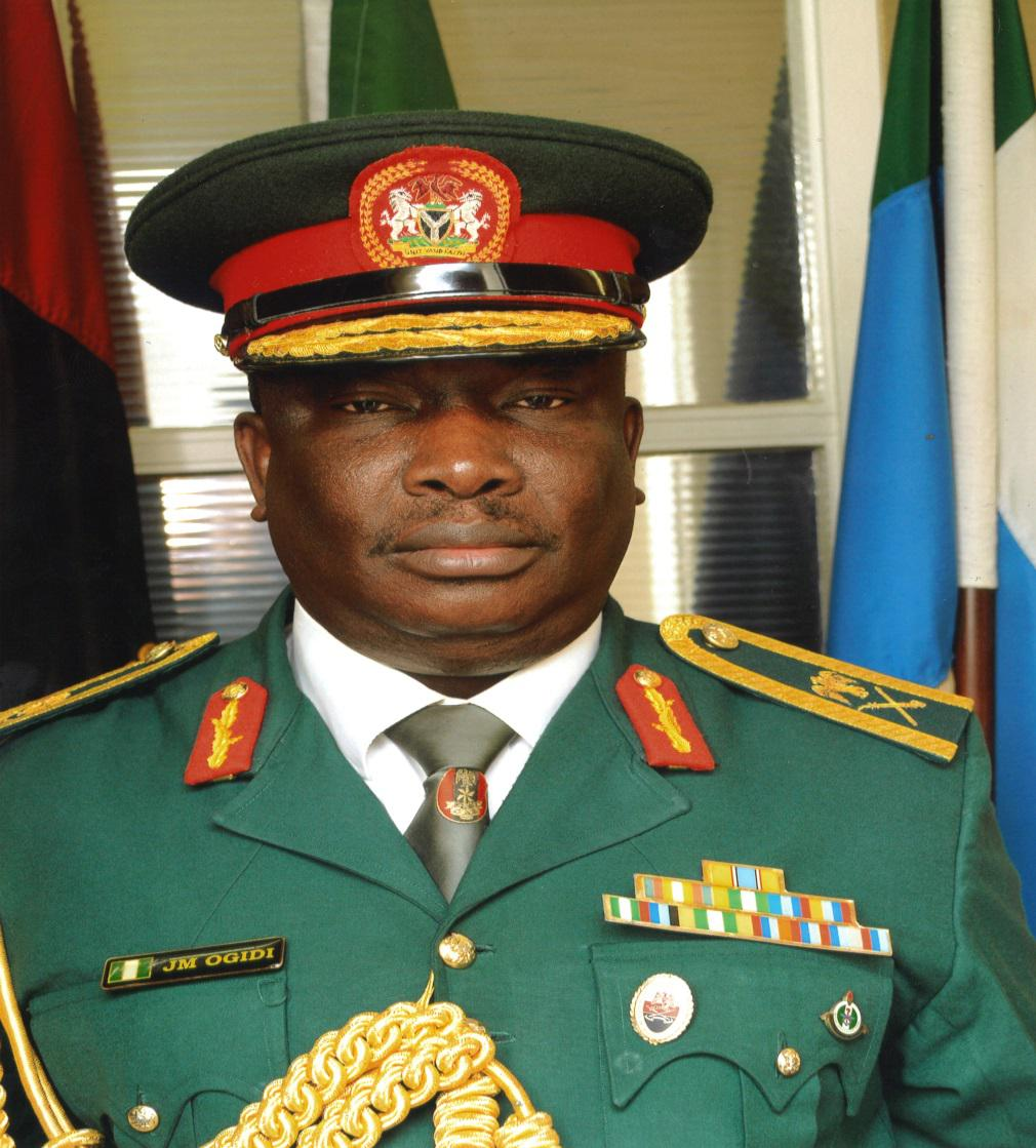 John Michael Ogidi